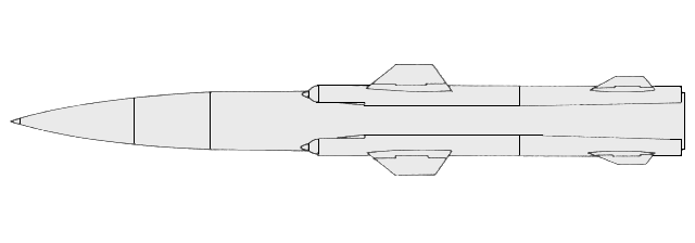 3M80 Moskit missileProfil du missile 3M80 Moskit ou SS-N-22 Sunburn